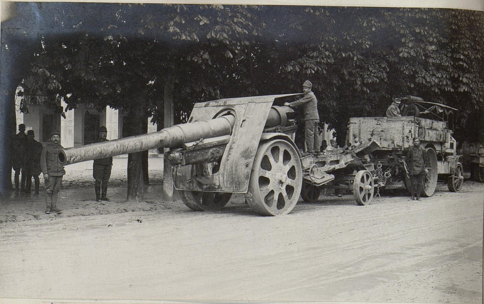 15cm Feldkanone M15/16 in Vittorio.